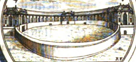 Medaille (Ausschnitt) mit einer Ansicht des sogenannten Hetzgartens in Berlin